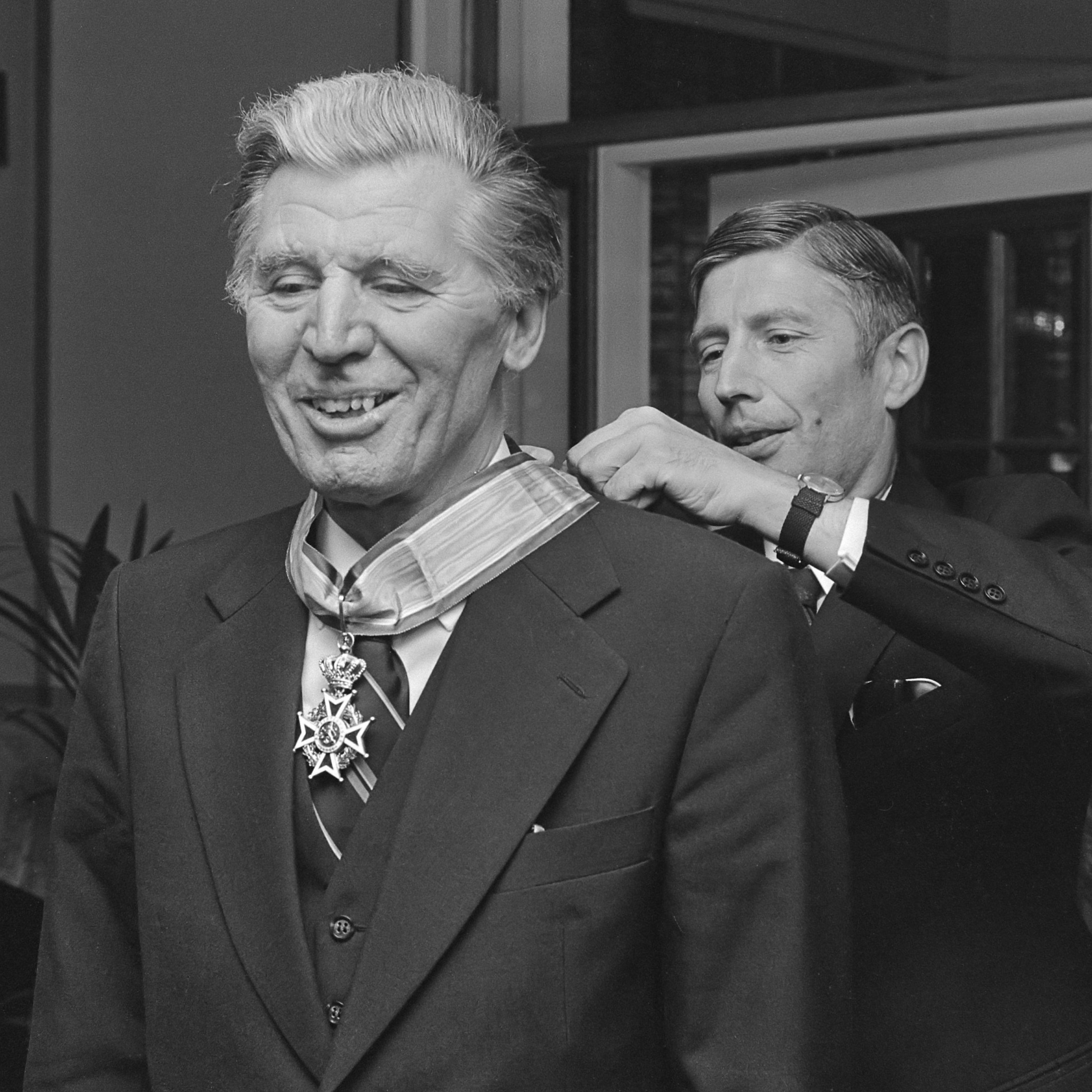 Premier Van Agt hangt Koninklijke onderscheiding om bij mr. Hartsuiker 30 augustus 1978